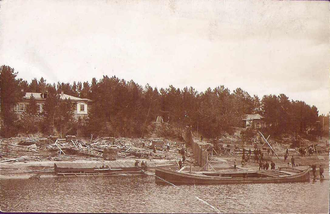 Боровичи. Берег реки Мсты